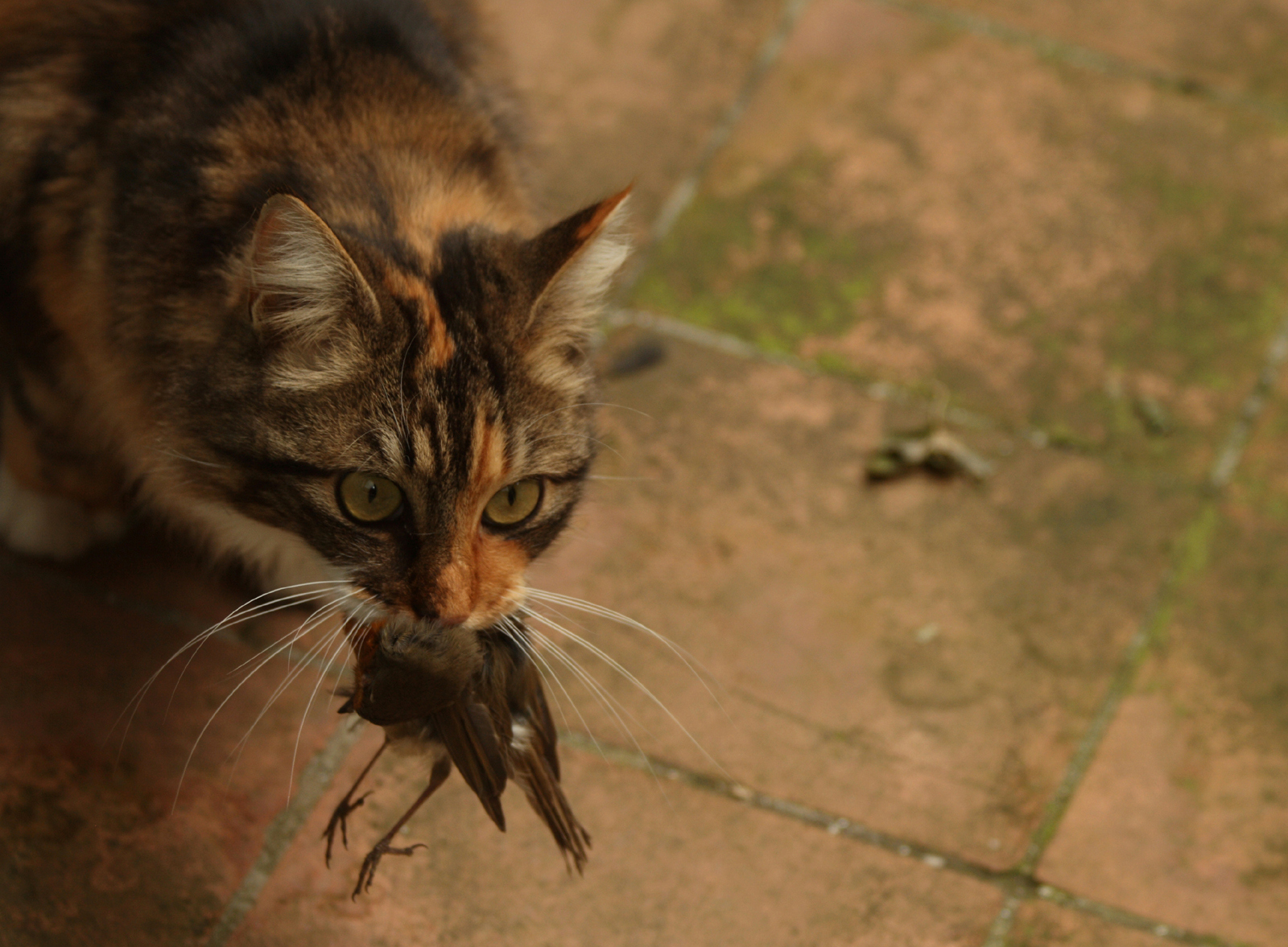 Mon chat, retour de chasse